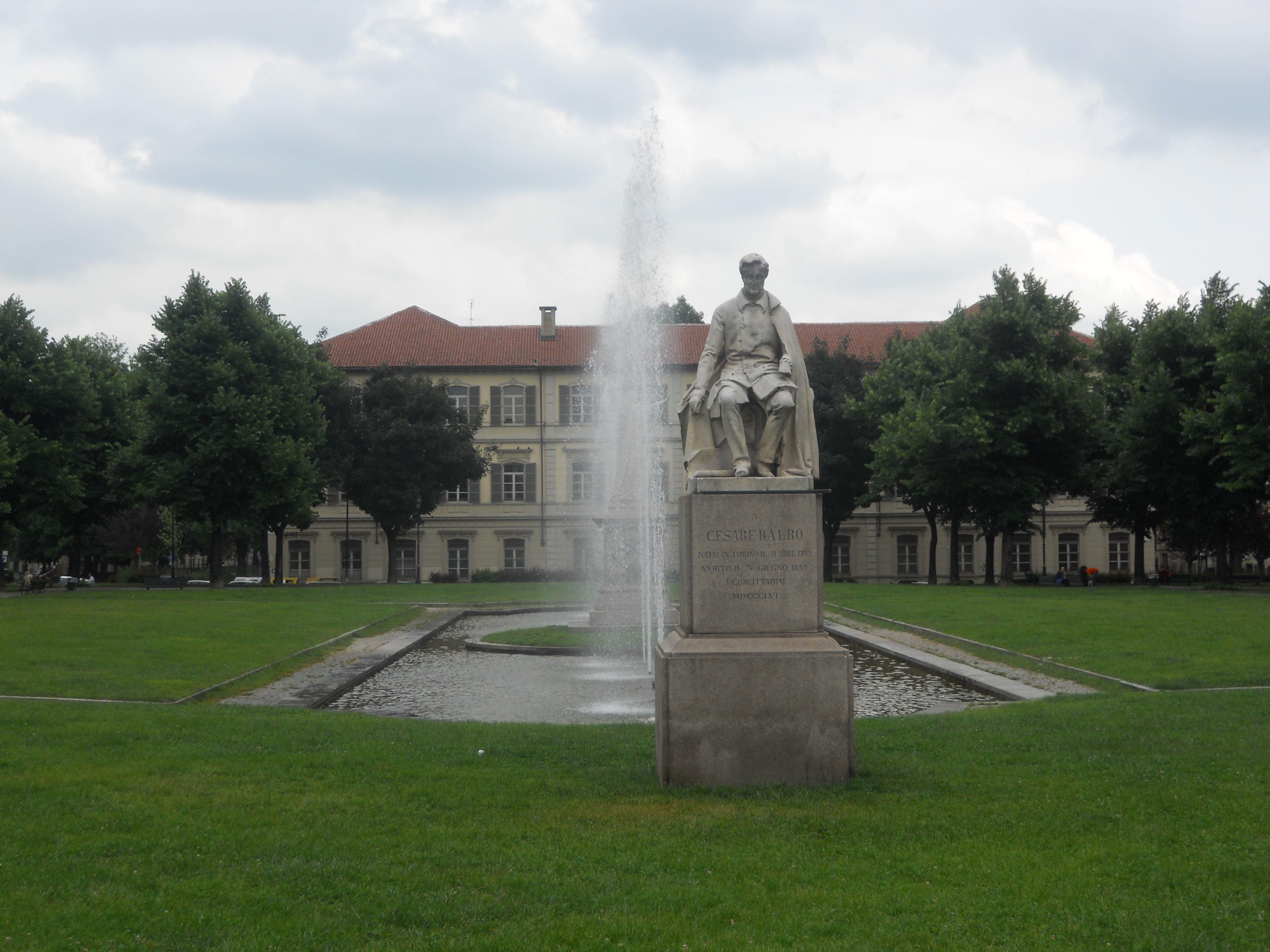 Giardini e fontane Piazza Cavour